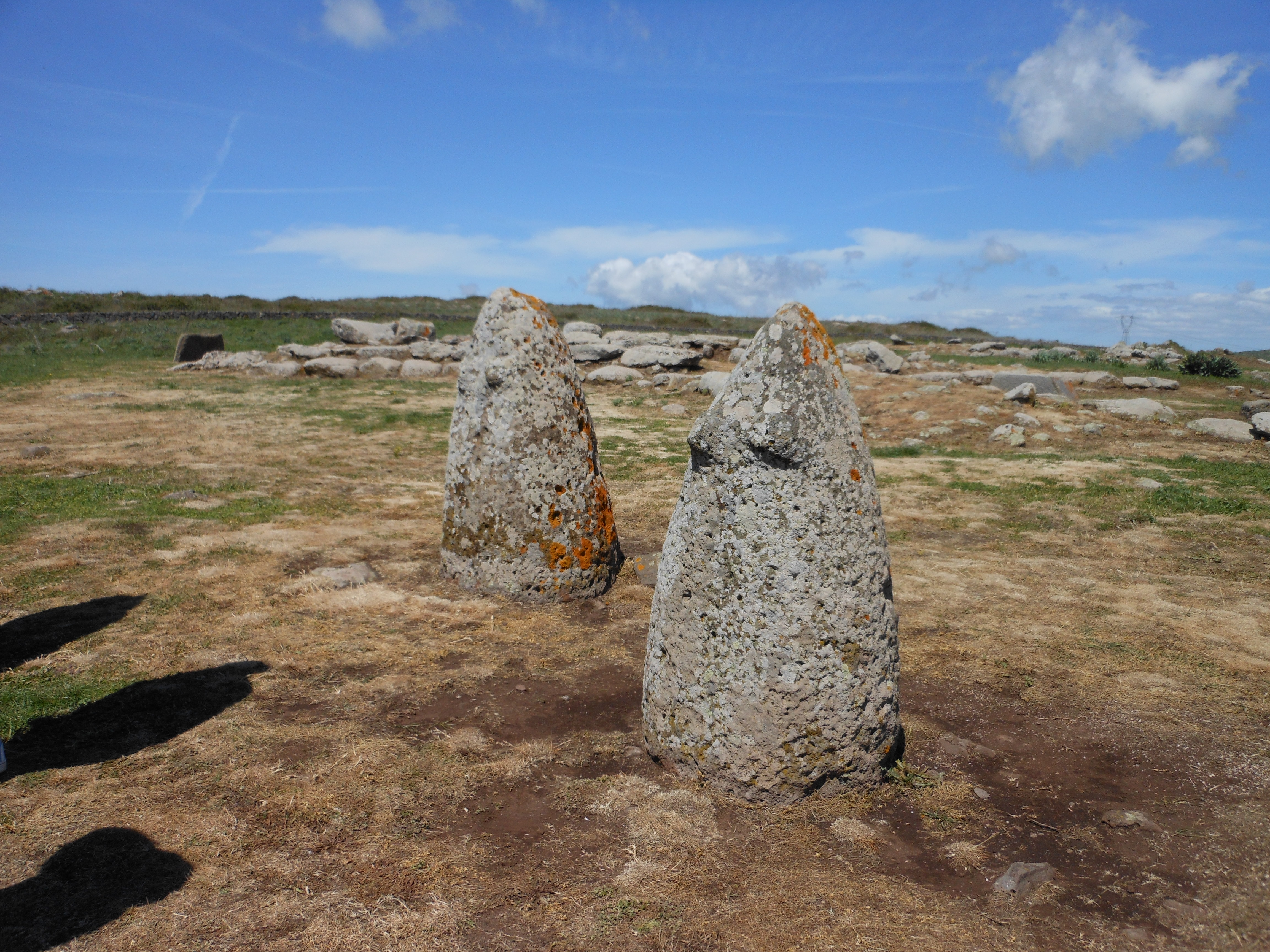 Macomer - Area archeologica di Tamuli